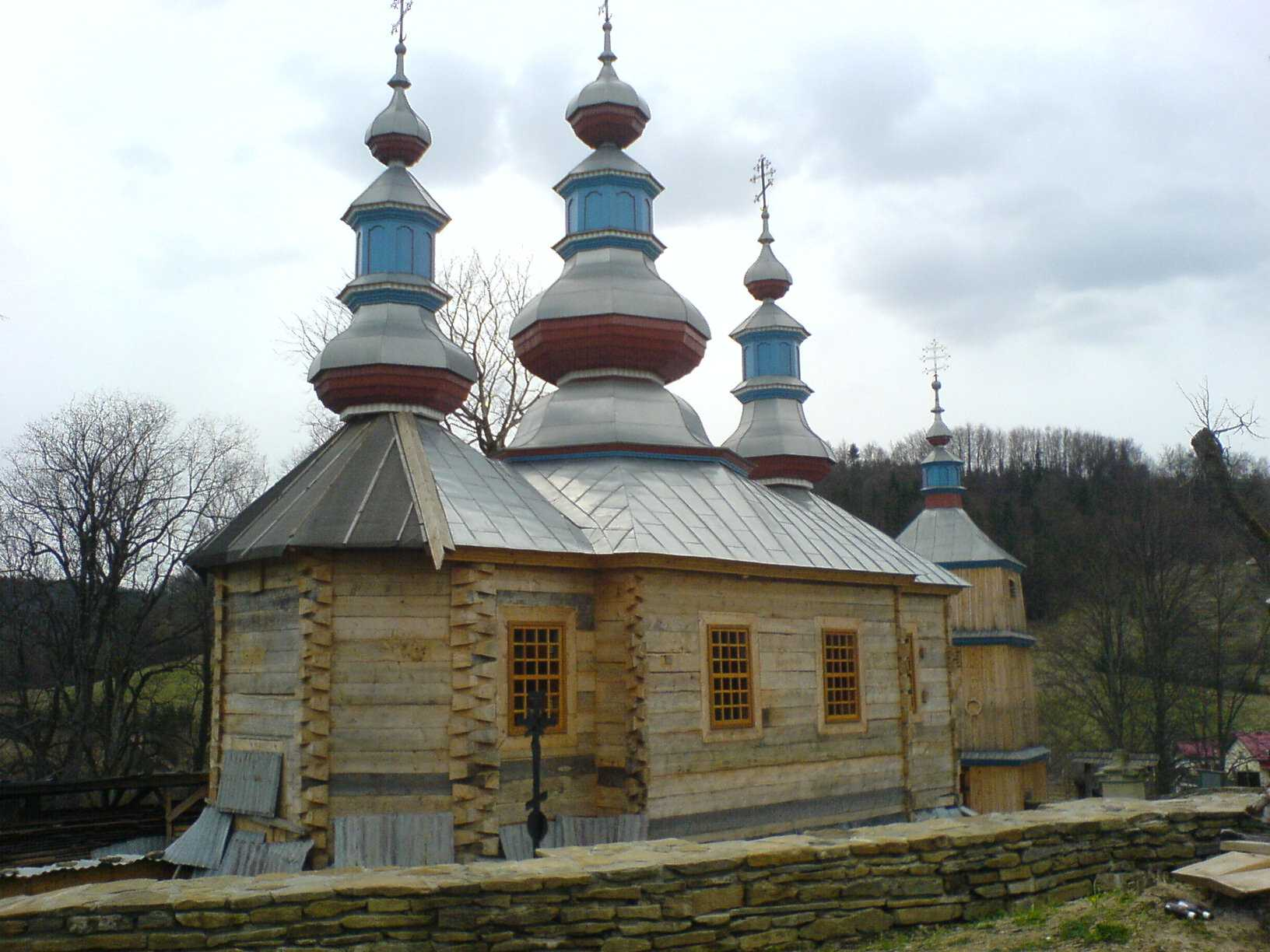 Cerkiew w odbudowie - Komańcza